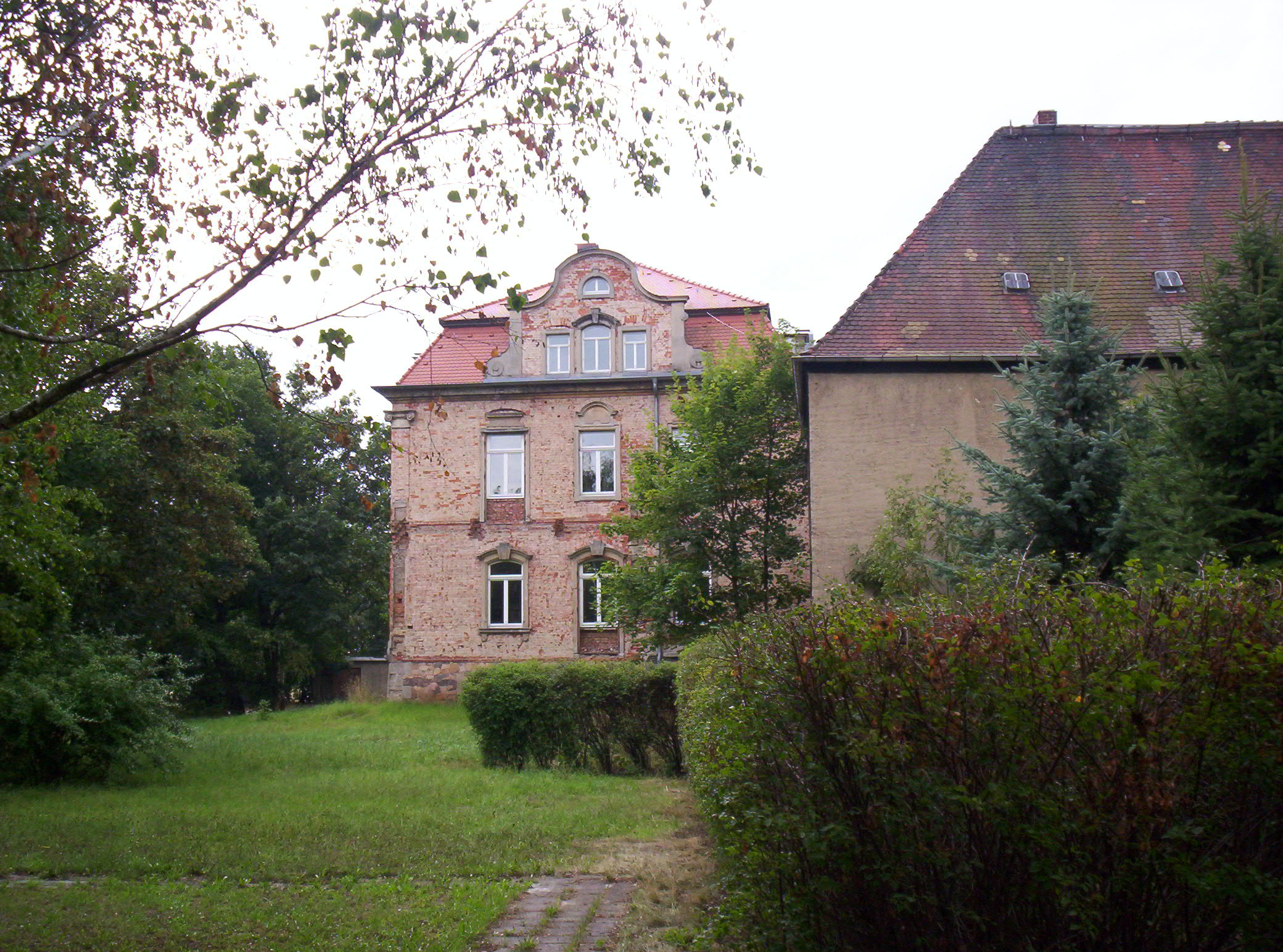 Gutshaus Kahnsdorf